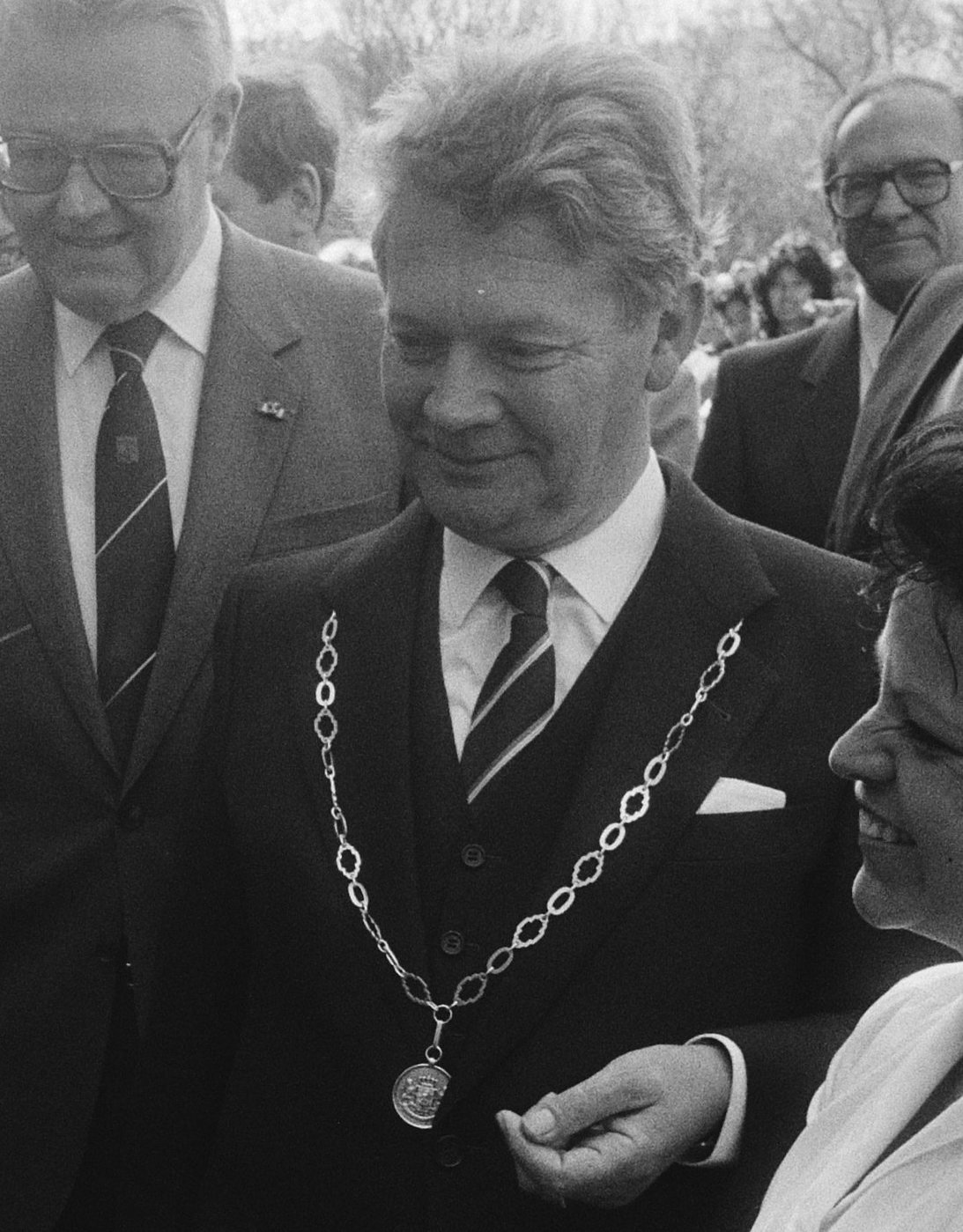 Collectie / Archief : Fotocollectie Anefo Reportage / Serie : Opening van het Gemini-ziekenhuis in Den Helder door koningin Beatrix Beschrijving : Koningin Beatrix in gesprek, rechts burgemeester Hans Idskes de Haan Datum : 10 mei 1983 Locatie : Den Helder, Noord-Holland Trefwoorden : burgemeesters, koninginnen, openingen, ziekenhuizen Persoonsnaam : Beatrix (koningin Nederland), Haan, H.I. de Fotograaf : Bogaerts, Rob / Anefo Auteursrechthebbende : Nationaal Archief Materiaalsoort : Negatief (zwart/wit) Nummer archiefinventaris : bekijk toegang 2.24.01.05 Bestanddeelnummer : 932-5862